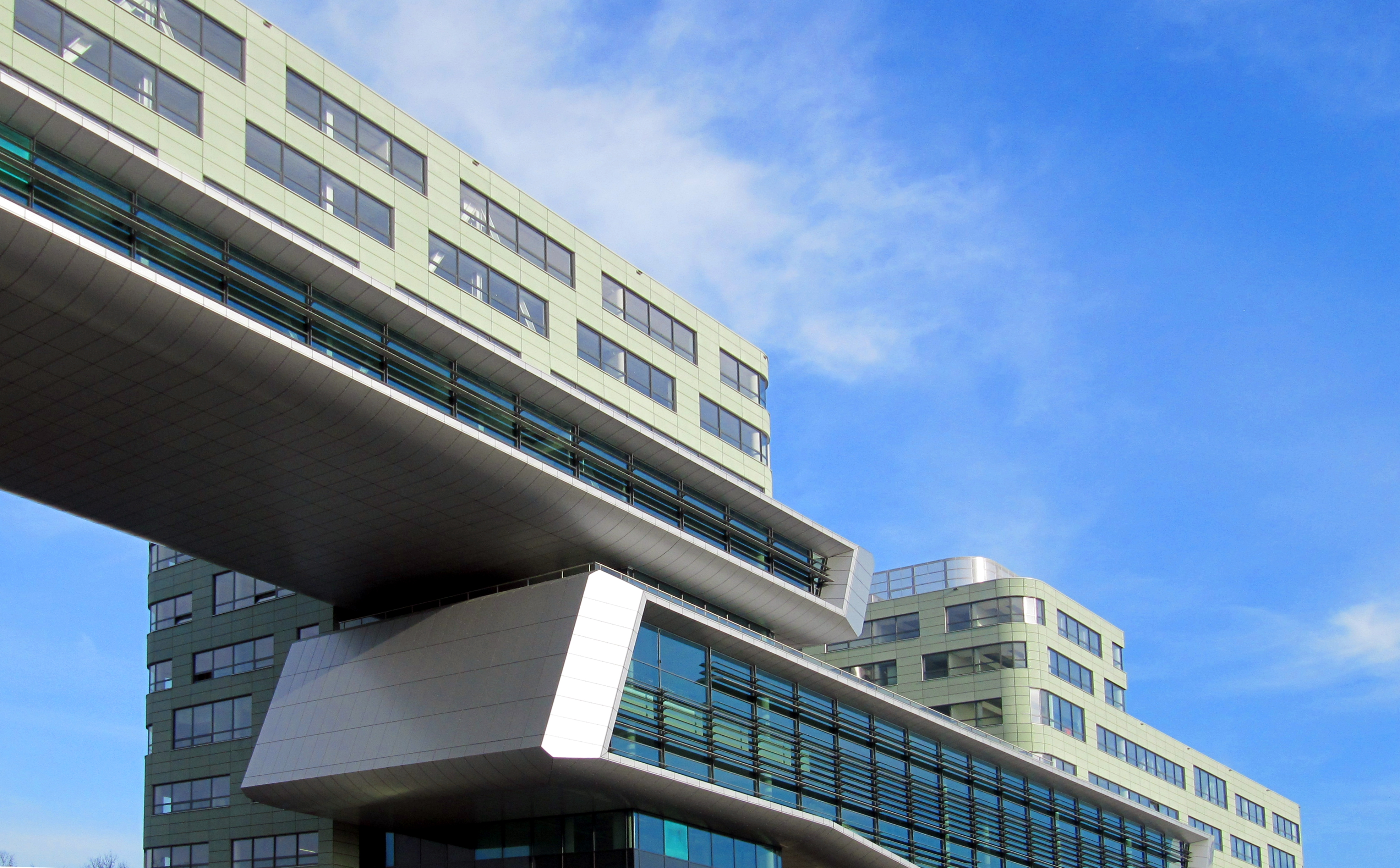 Textilbeton in der Umsetzung, ROC Leiden